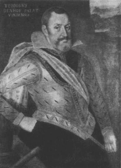 Беларуская (тарашкевіца): Тэадор Дэнгаф